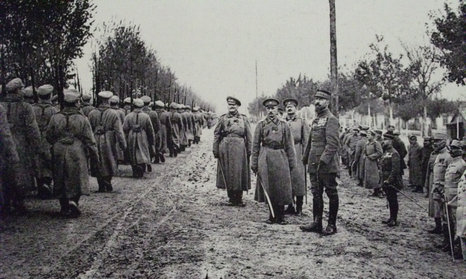 Les troupes russes défilent devant le général Henri Gouraud et le général Nikolaï Lokhvitski au camp de Mailly en octobre 1916.